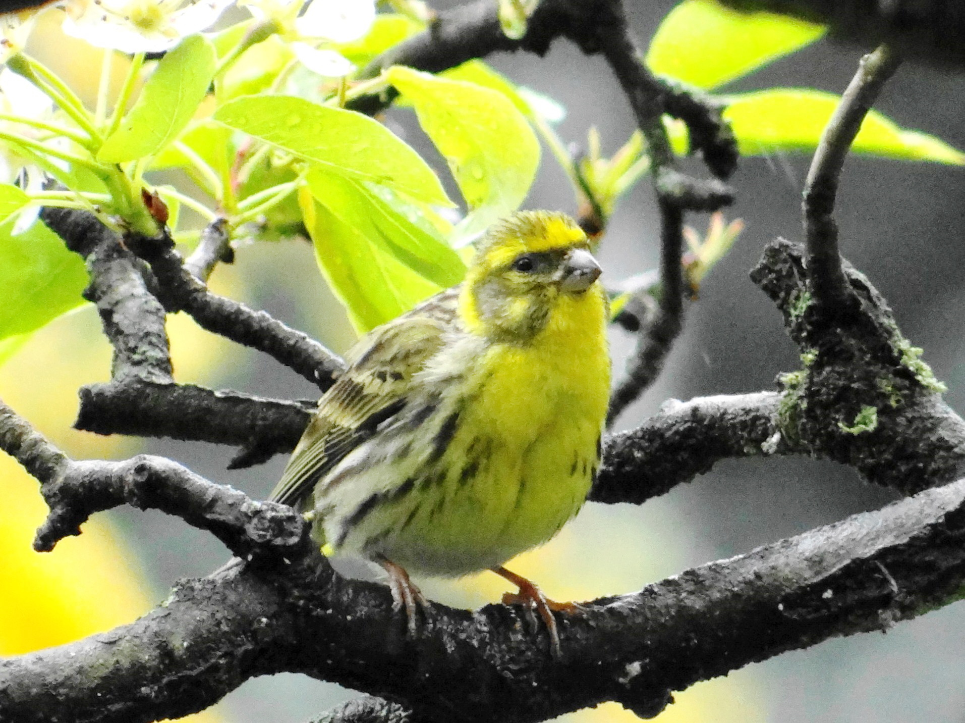 serin cini un jour de pluie